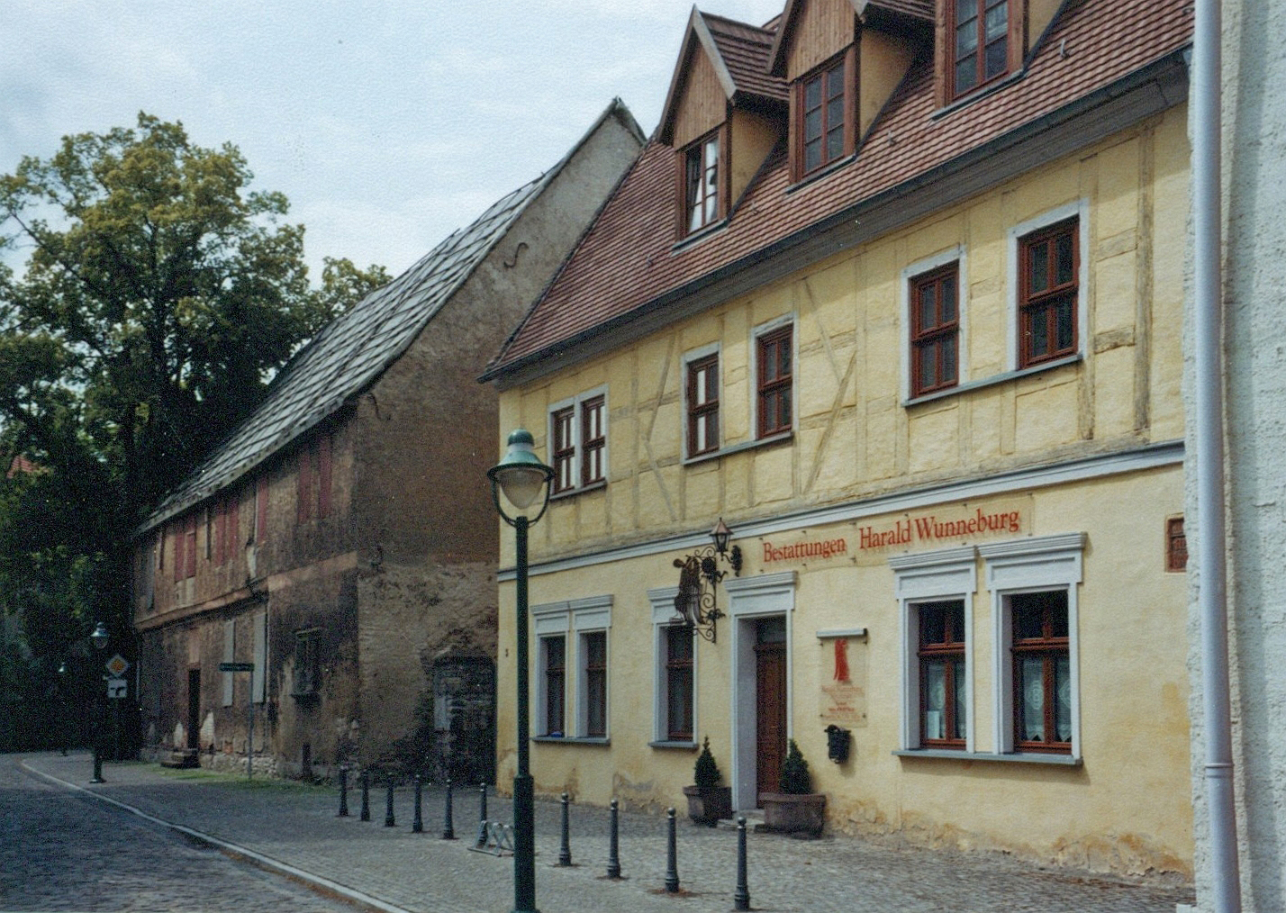 April 2008. Im Hintergrund ist das Terminierhaus „Kirchstraße 2“ (Dominikaner-Bettelmönche) und im Vordergrund das Terminierhaus „Kirchstraße 3“ (Augustiner-Bettelmönche) zu sehen. Das Terminierhaus der Dominikaner wurde 2011 abgerissen.